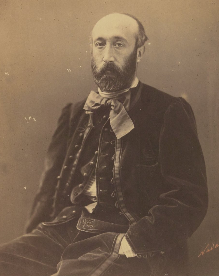 Atelier Nadar: Ernest Feydeau (1821-1873), Schriftsteller